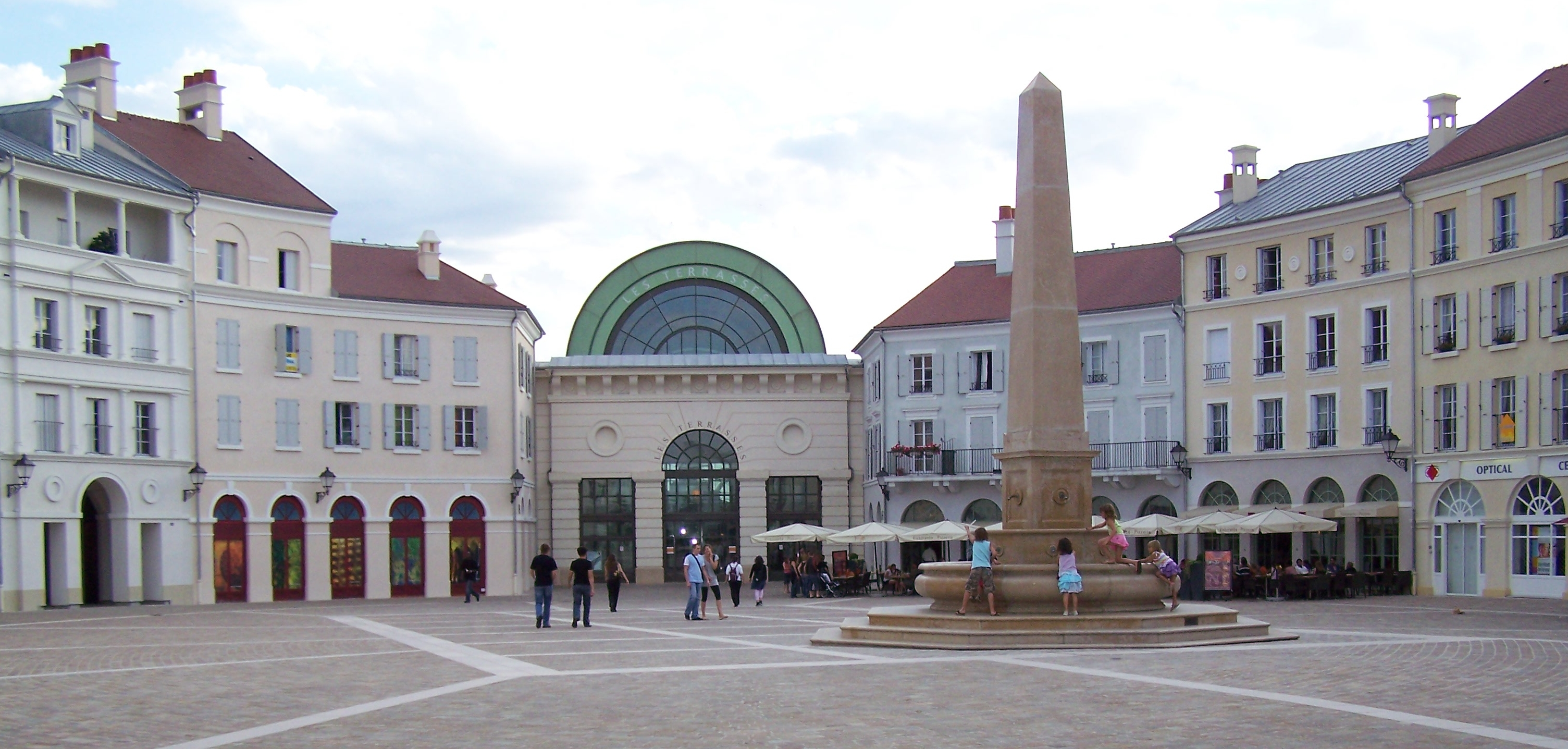 Serris (Seine-et-Marne, Île-de-France, France) : Place de Toscane.